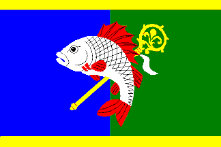 vlajka obce Urbanice